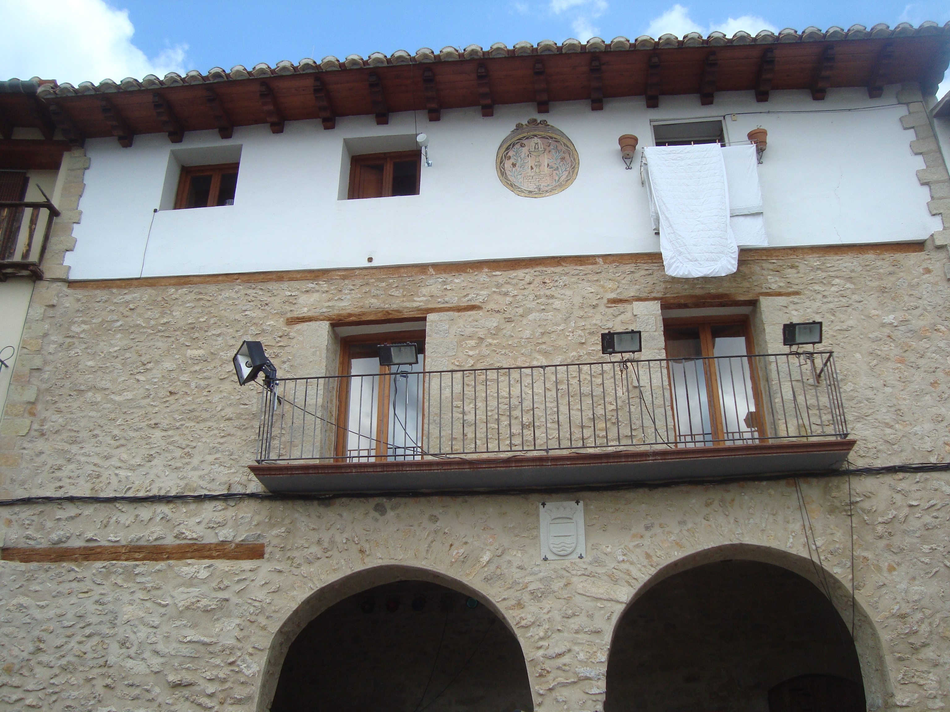 Ayuntamiento de Palanques (Castellón)